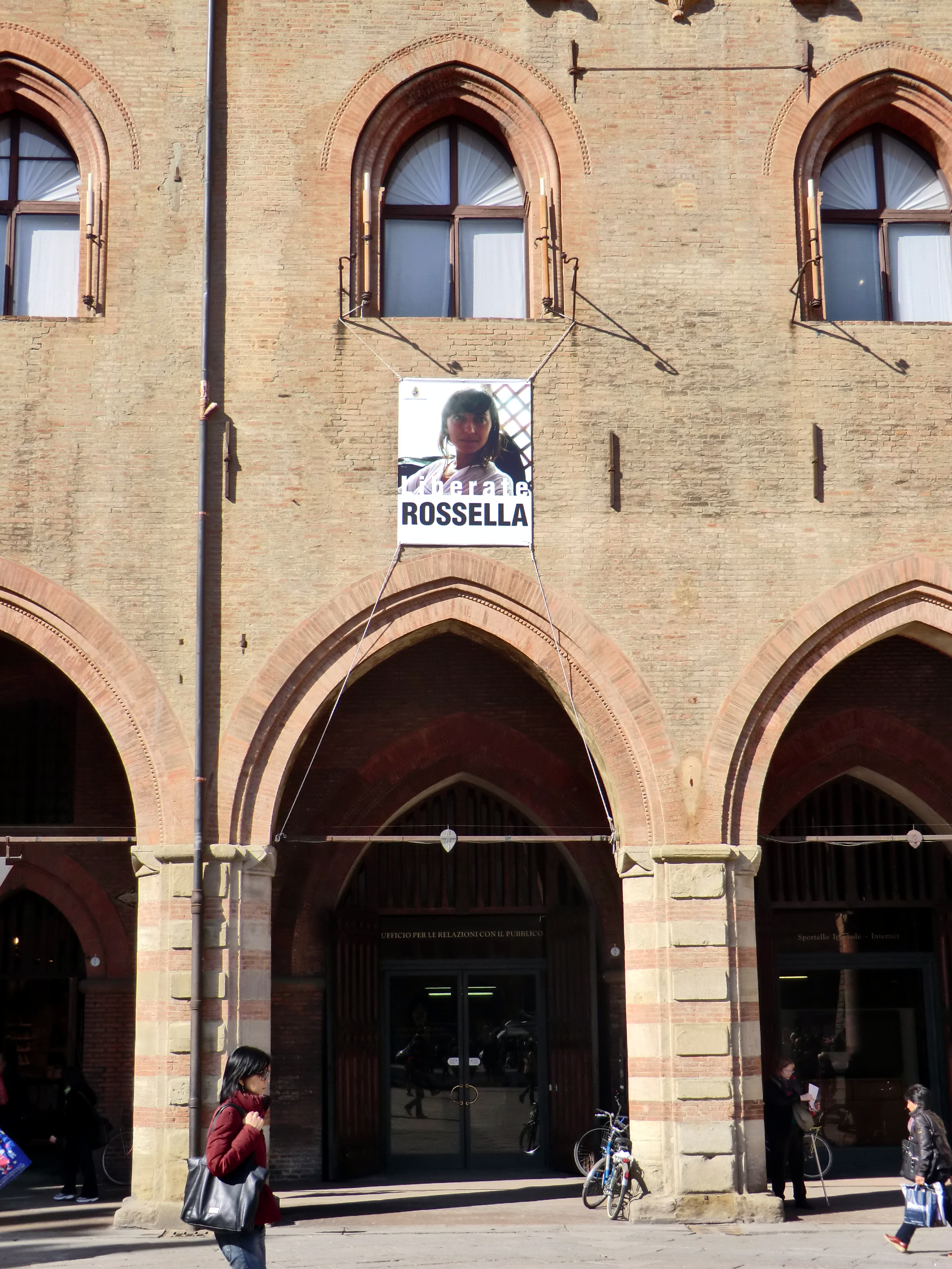 Un manifesto affisso dal Comune di Bologna chiede la liberazione di Rossella Urru.